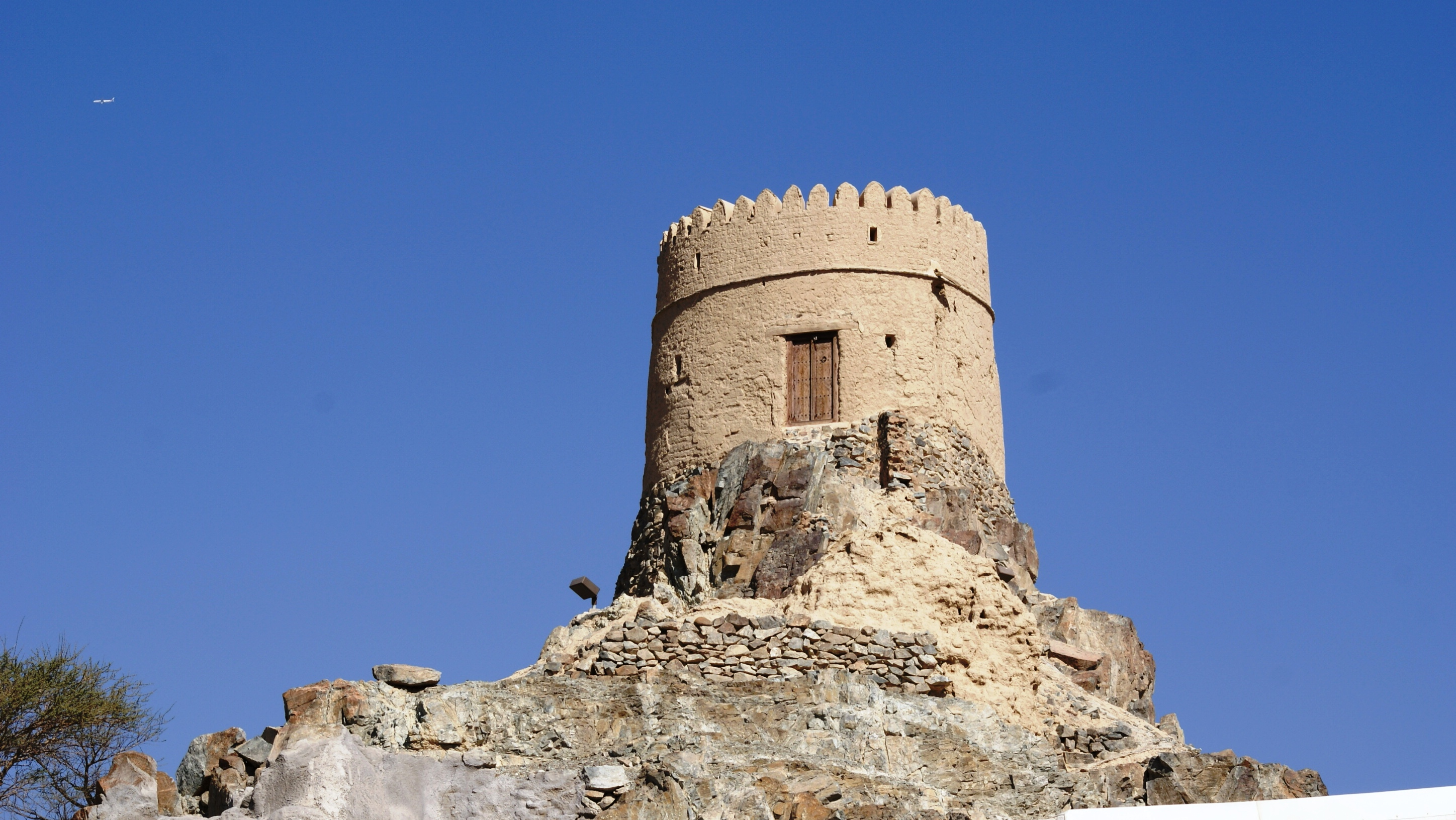 ഹത്തയിലെ ഒരു പഴയ കോട്ട